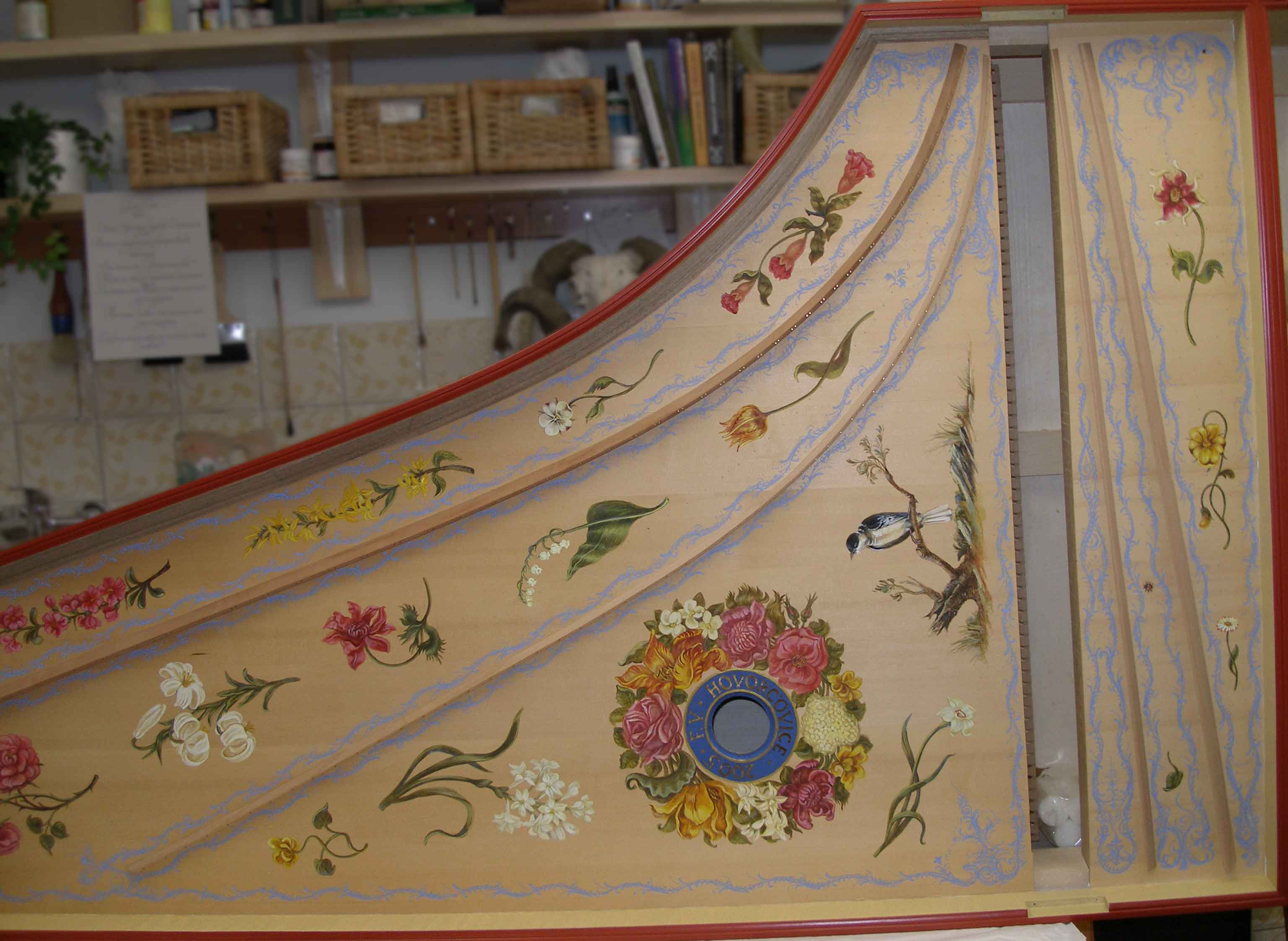 Dílo Miluše Poupětové Dekory na čembalech jsou volné, avšak dobově pojaté kopie. Toto je typ francouzský, kopie dle Hemsche, byly to vždy rodiny, několik generací, takže toto Henry Hemsch, 1754.